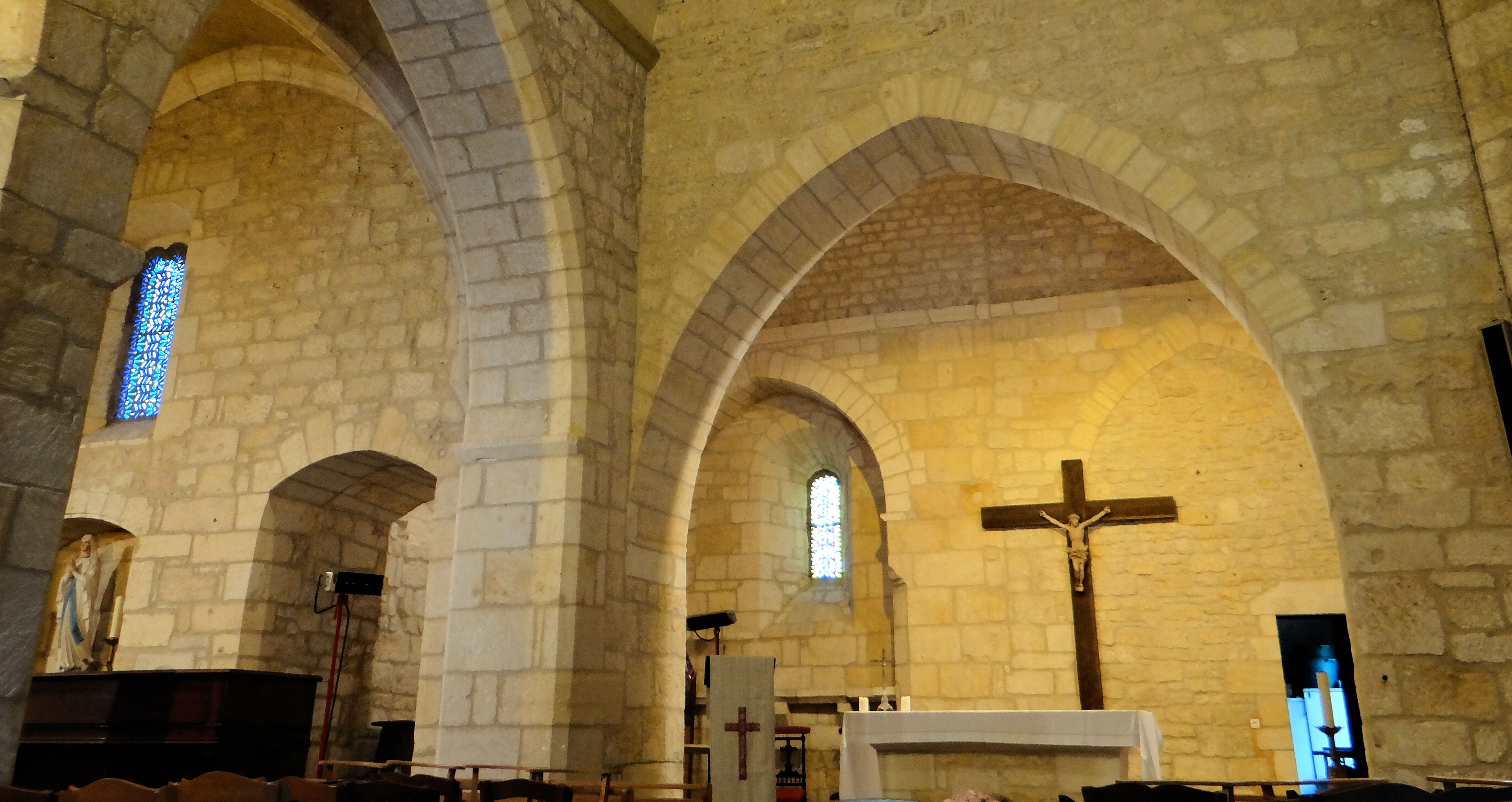 Calviac-en-Périgord - Église Saint-Pierre-ès-Liens - Les deux nefs, l'abside romane avec un Christ du XVe siècle